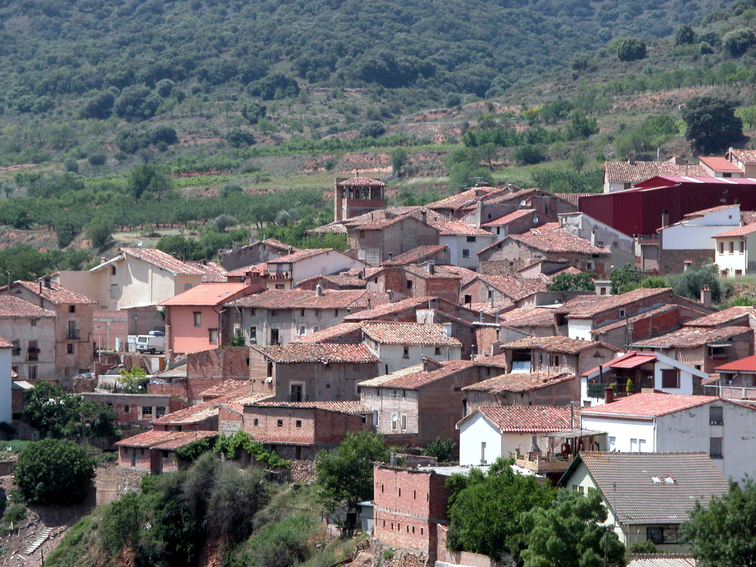 Santa Engracia del Jubera en La Rioja (España).